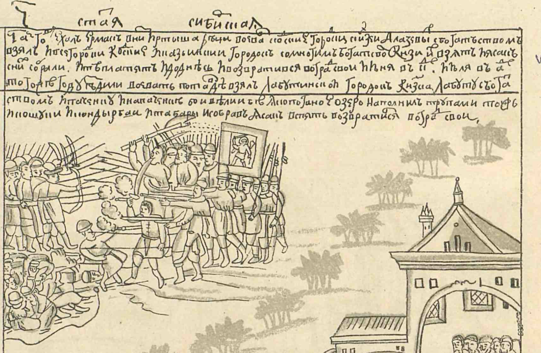 Бой казаков с отрядом кодских князей Алачевых, страница 48